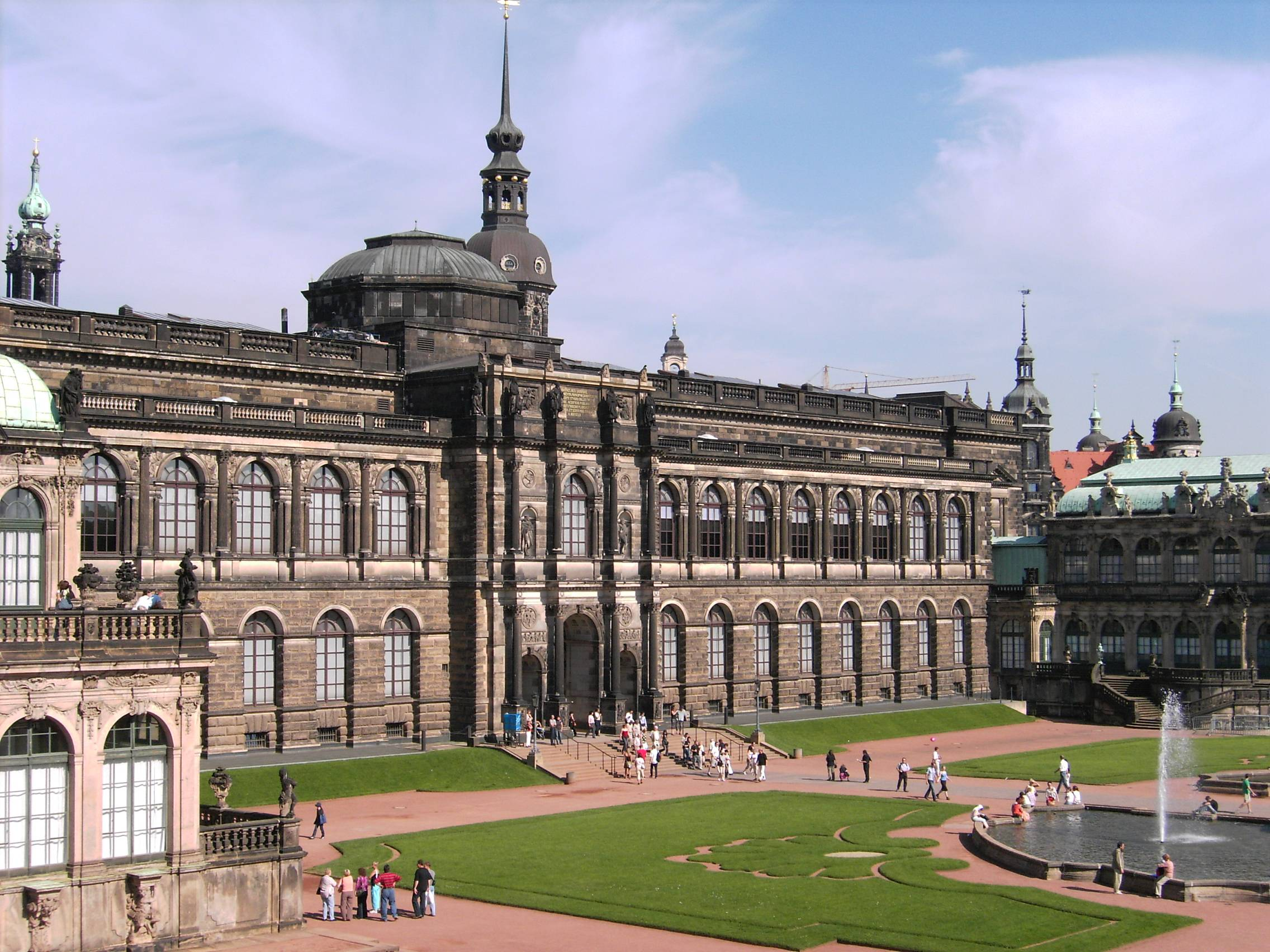 Dresden, Zwinger (Semperbau mit Gemäldegalerie)